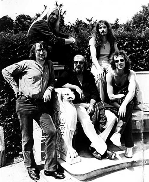 Pressefoto Floh de Cologne 1978